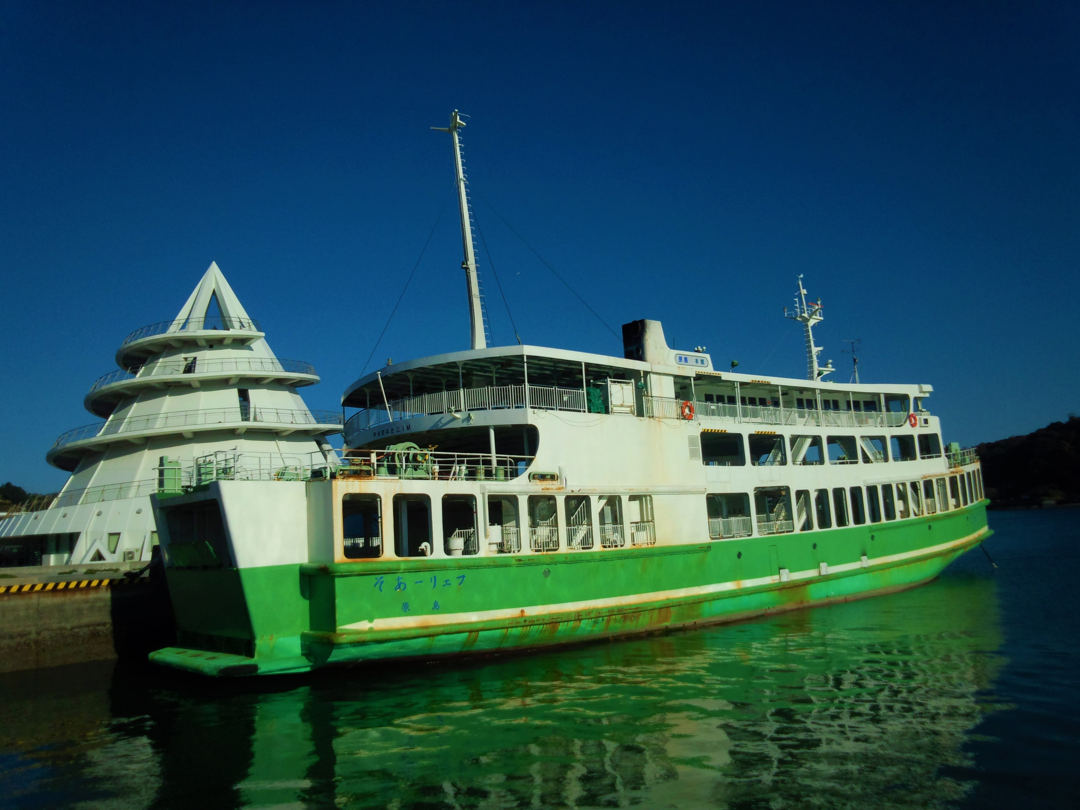 九州商船の「フェリーあそ」、引退後回航された三角東港にて撮影